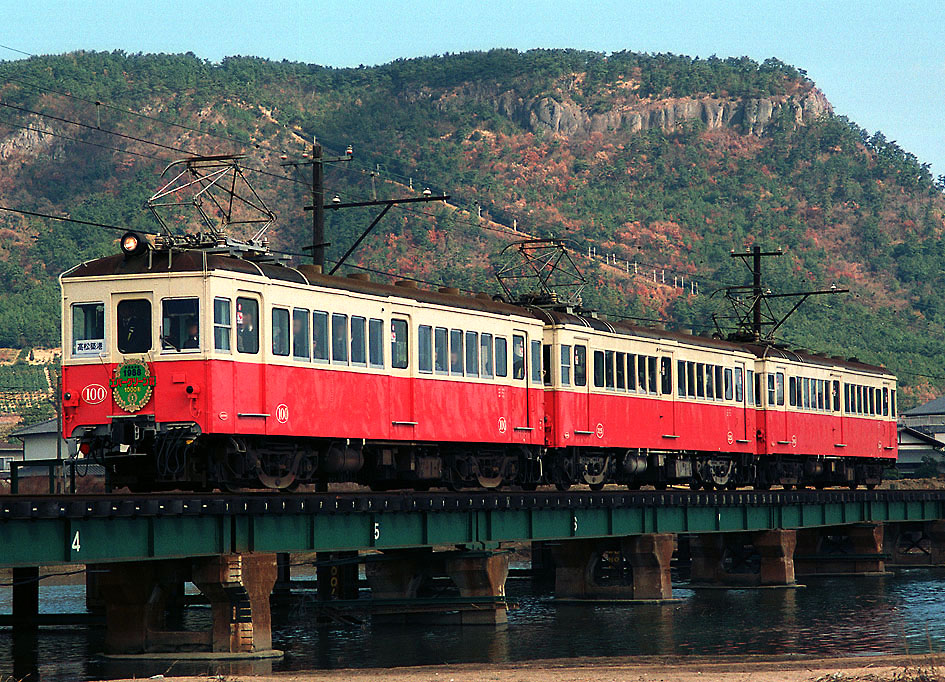 高松琴平電鉄 1000形100 鉄道友の会エバーグリーン賞受賞記念列車（100+3000形325+3000形300）